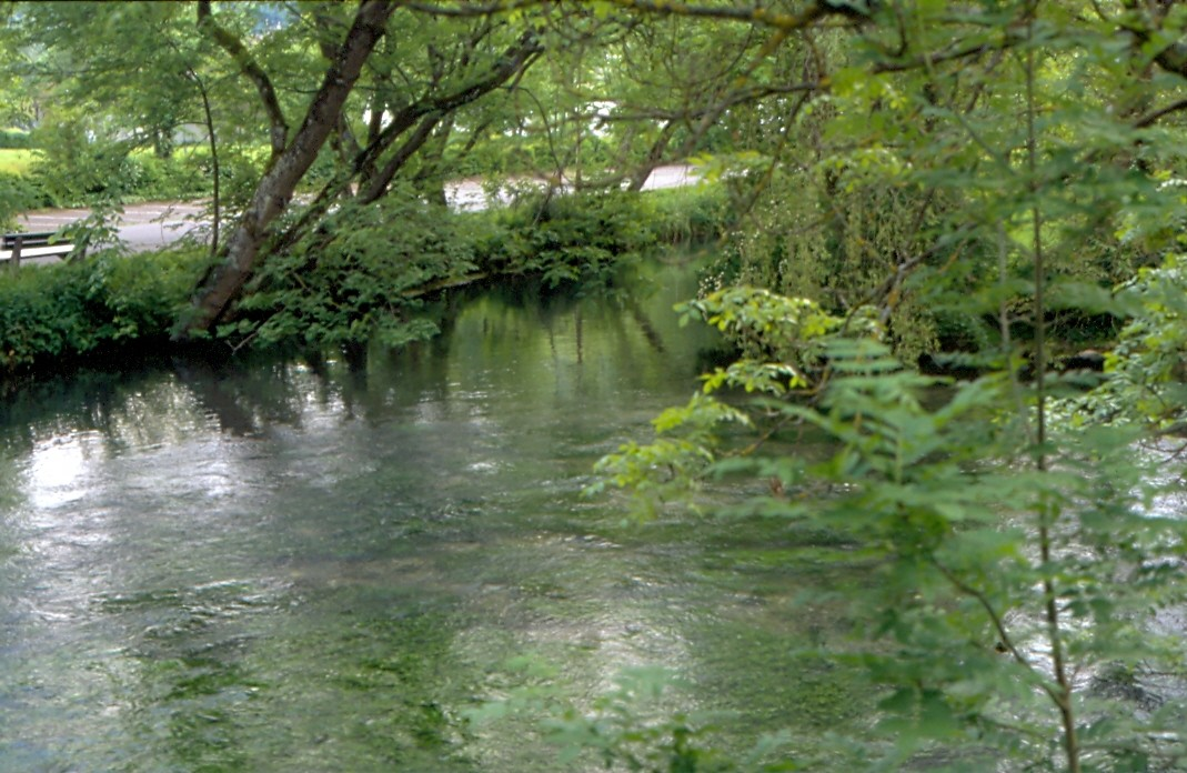 Die mündung der Ach (hinten) in die Blau (rechts) in Blaubeuren